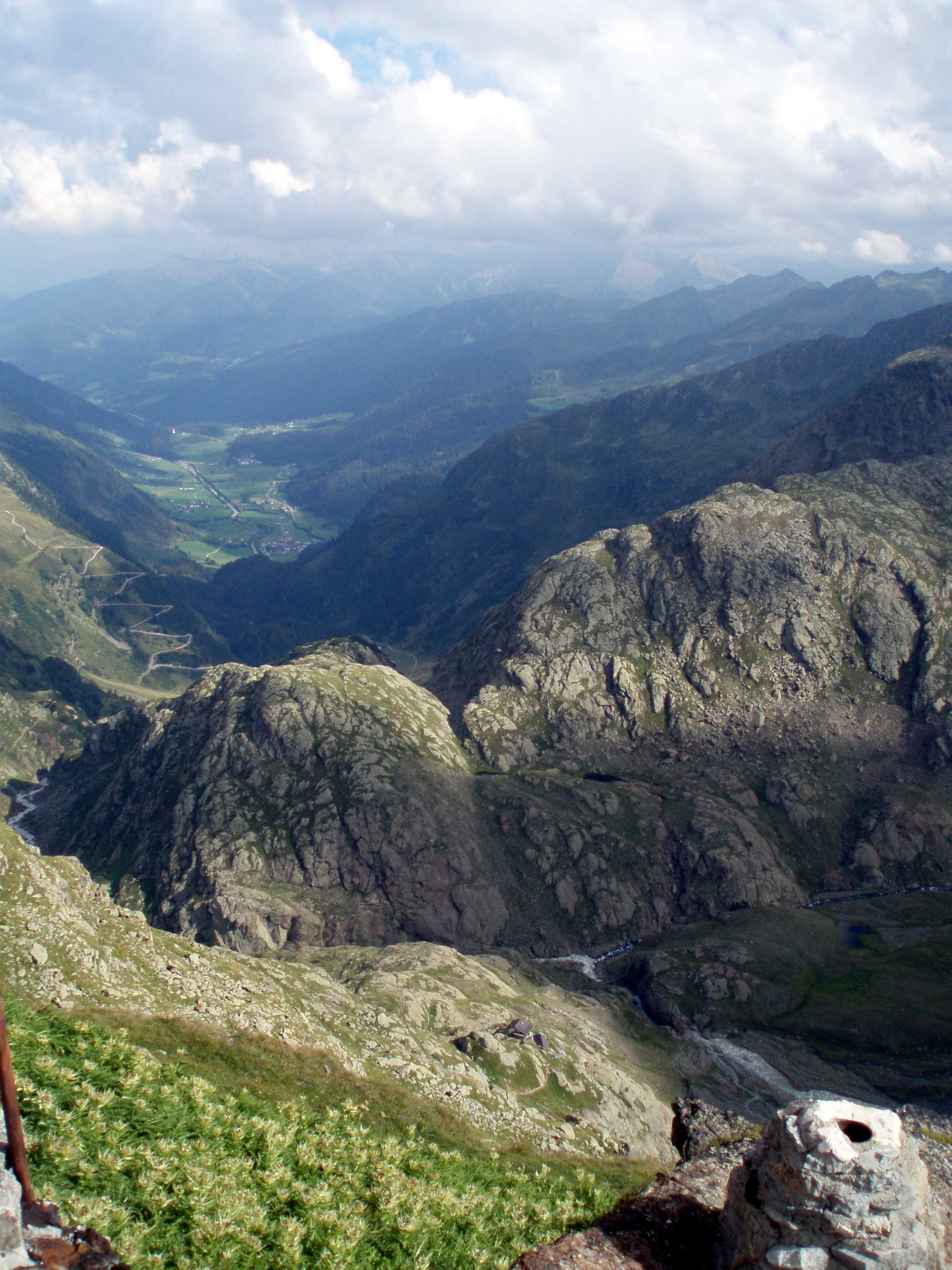 Blick von der Teplitzer Hütte zur Grohmannhütte